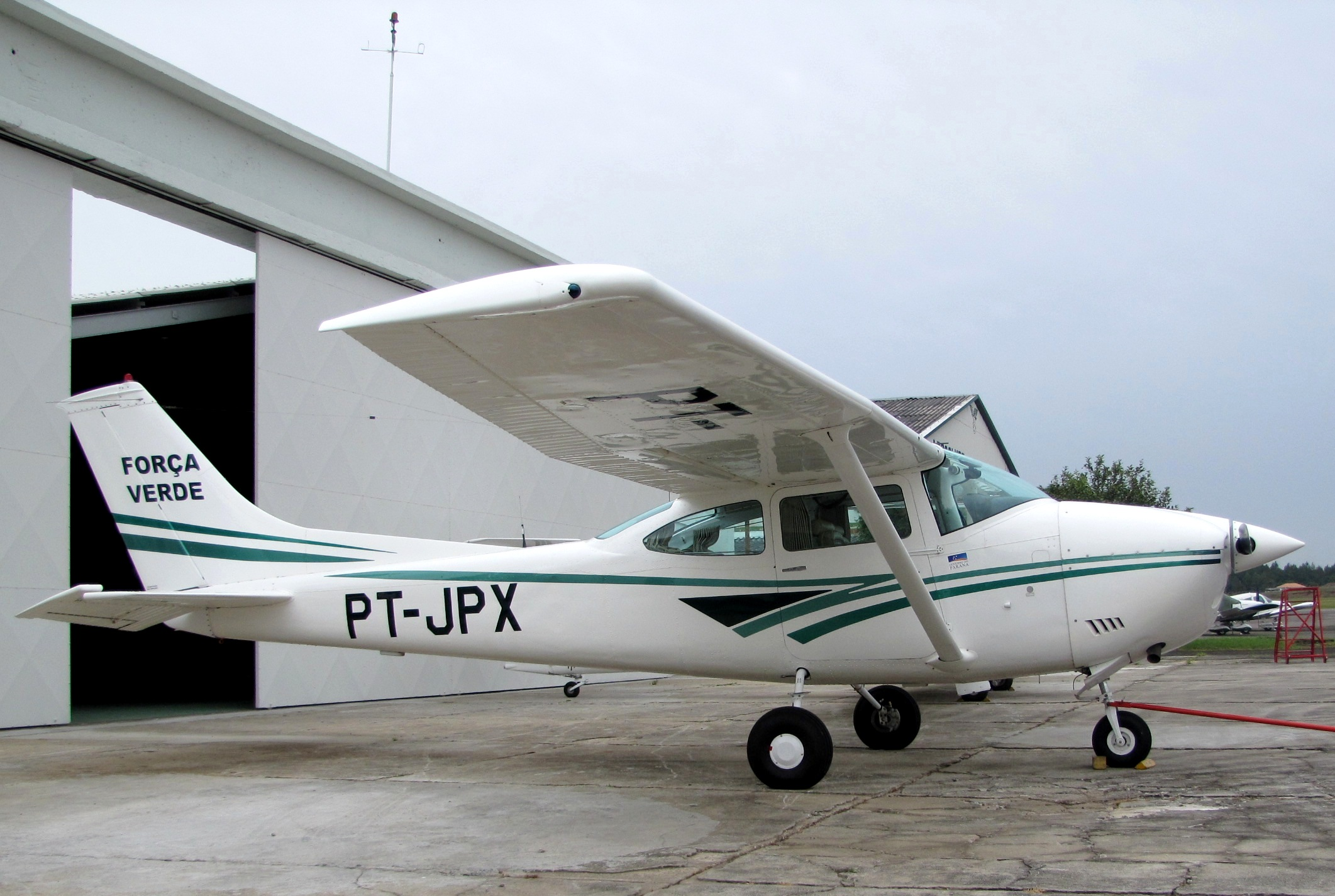 Aeronave da Força Verde da PMPR.